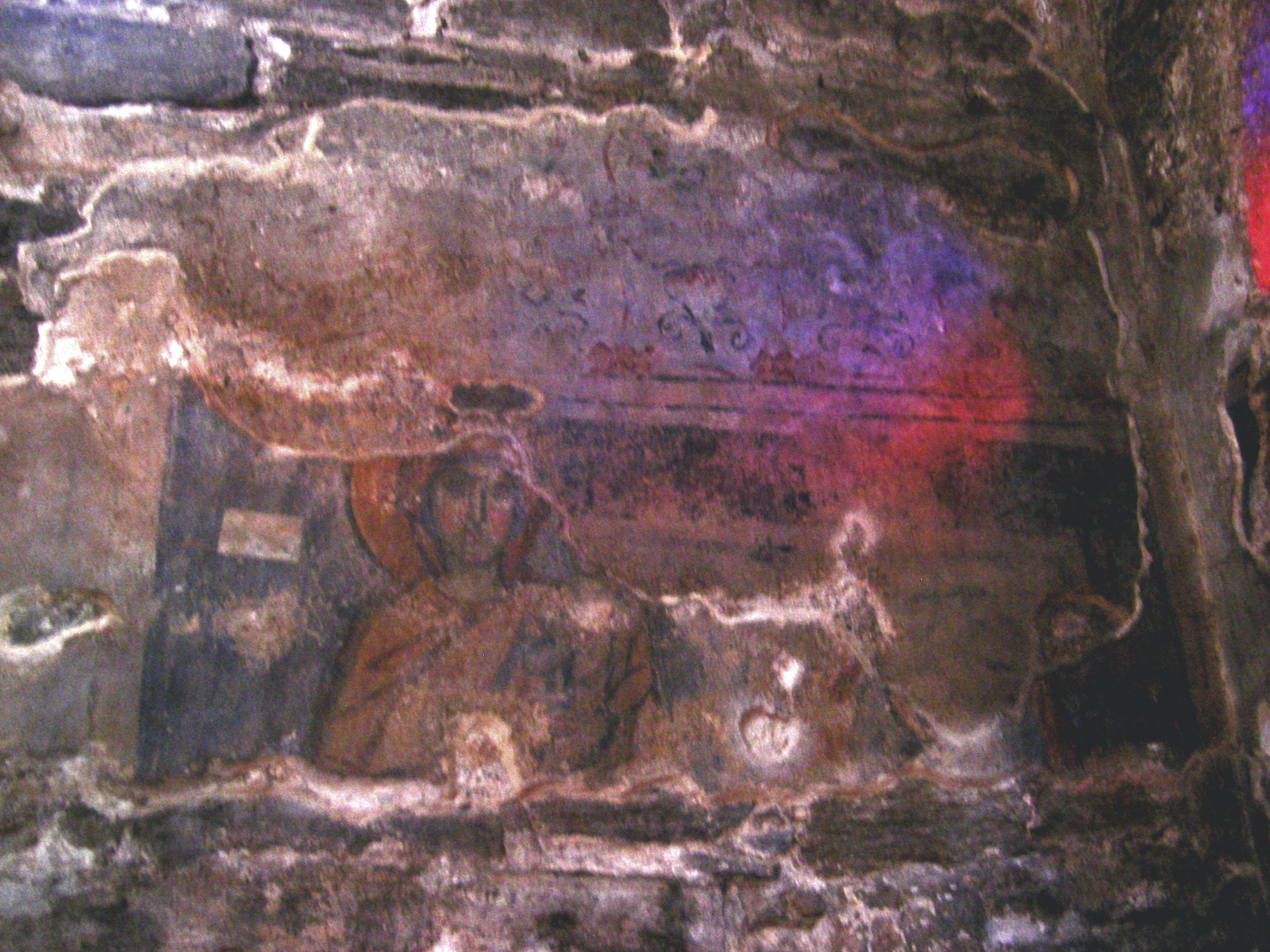 Fragment de fresque : Sainte Elisabeth, dans une représentation de type Vierge à l'enfant. Mur nord de la chapelle St Nicolas. Plus ancienne fresque de la Panaghia Ekatontapyliani (VIIe-VIIIe siècle)